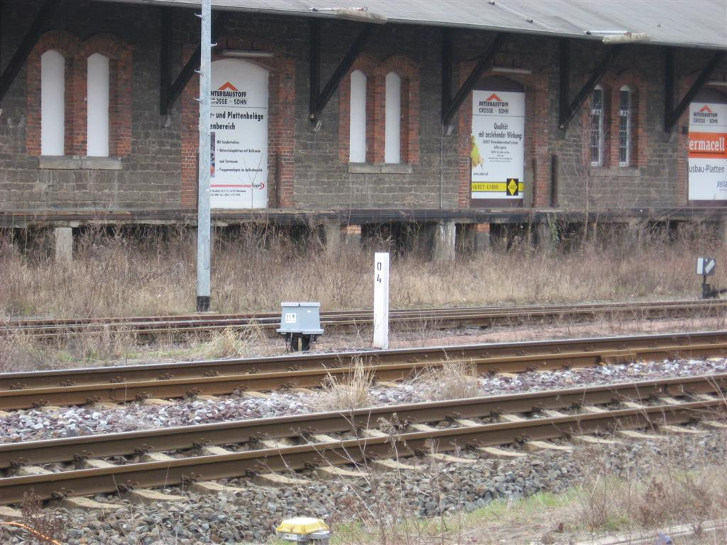 Kilometerstein im Bahnhof von Quedlinburg an der Strecke der Harzer Schmalspurbahnen